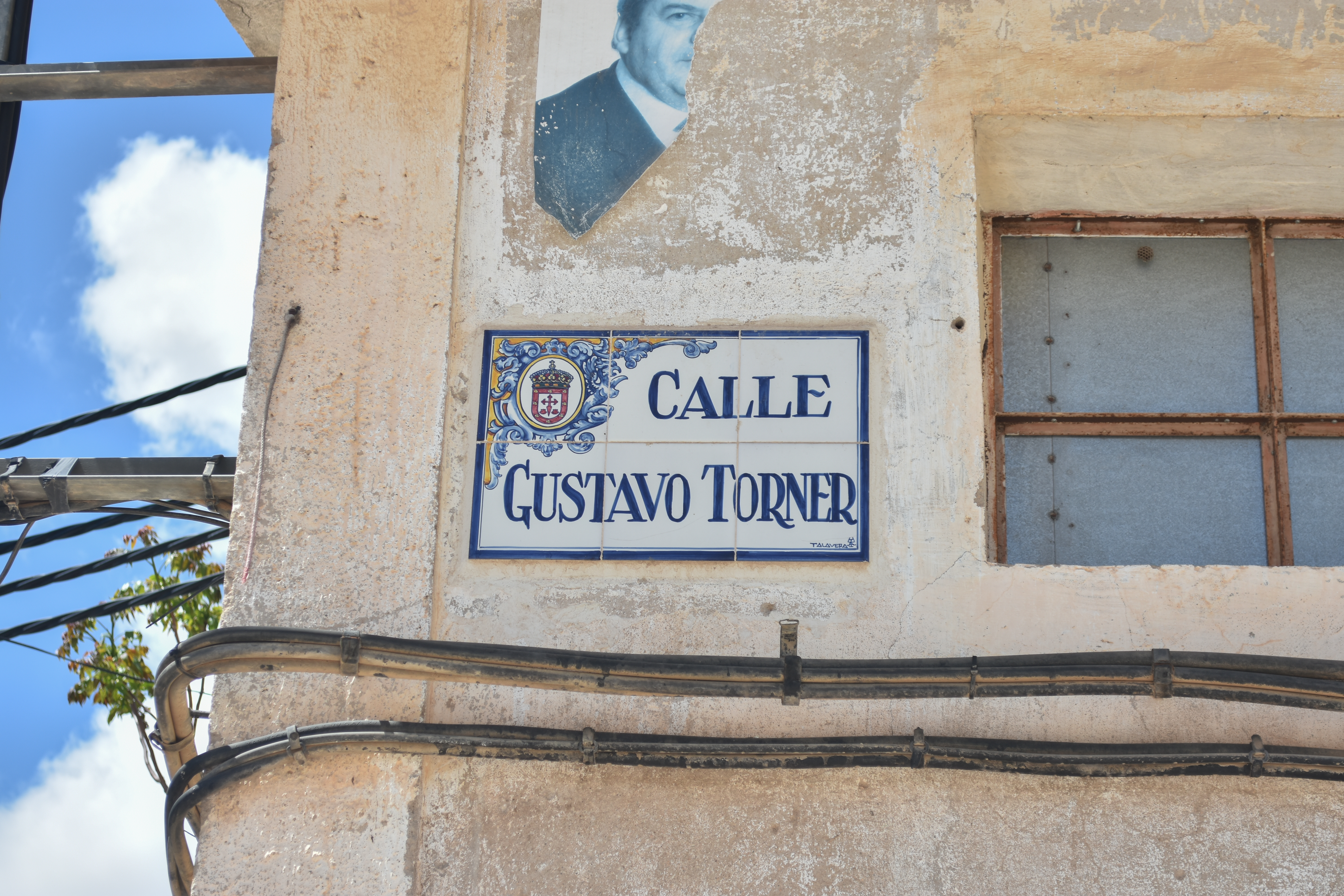 Calle Gustavo Torner, Villamayor de Santiago.